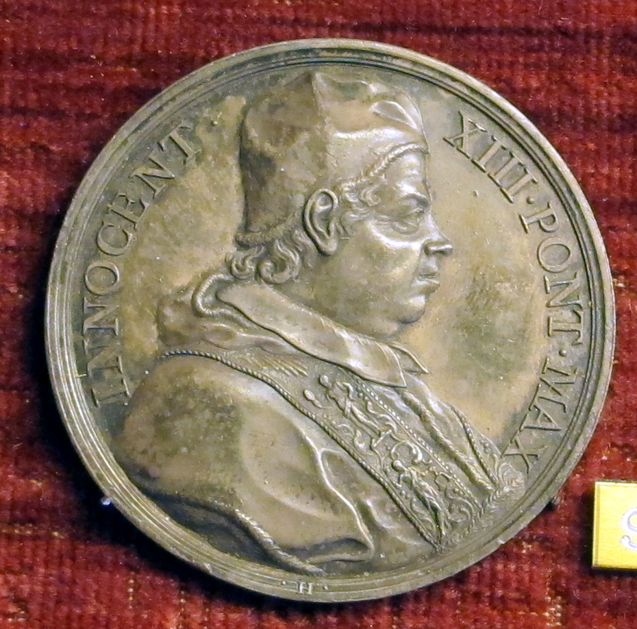 Innocenzo XIII (1655-1724). Medaglie romane '600-'700